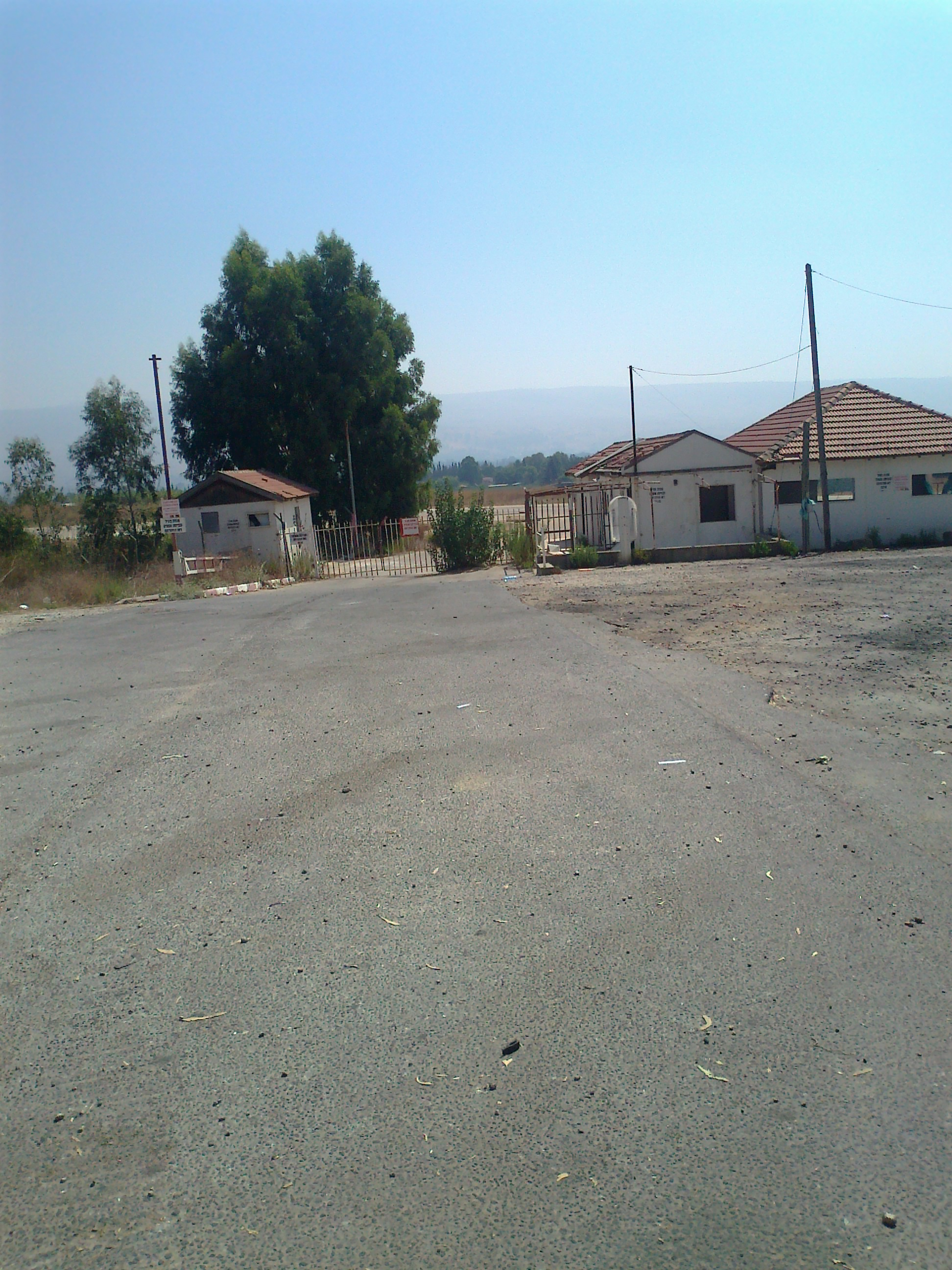 Airport old terminal Kiryat Shmona